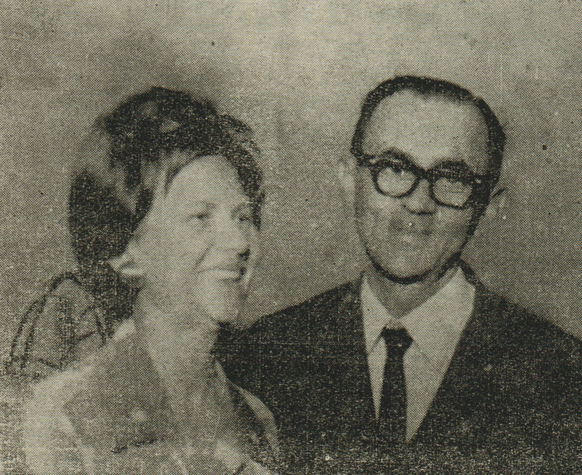 Governador do Piauí, Alberto Tavares Silva e a esposa Dona Florisa Silva.